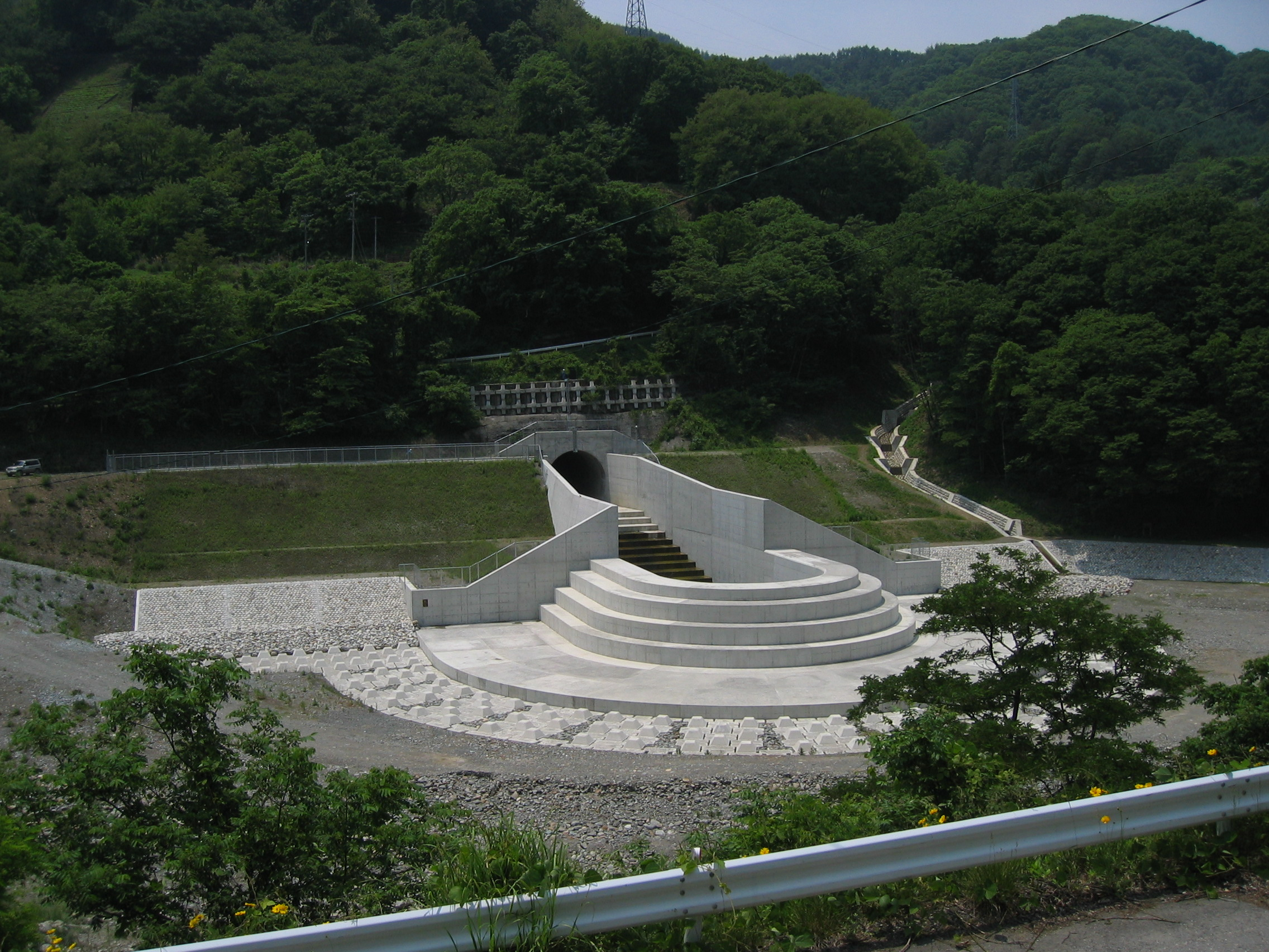 Miwa dam (美和ダム) is a dam in Nagano, Japan.